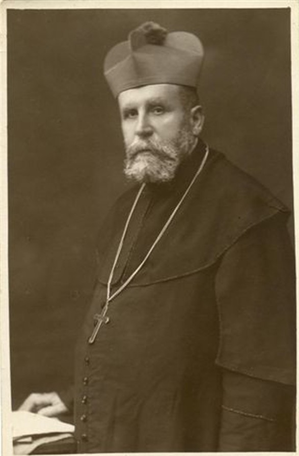 Adalbert Schindelar (1865-1926), erster altkatholischer Bischof Österreichs